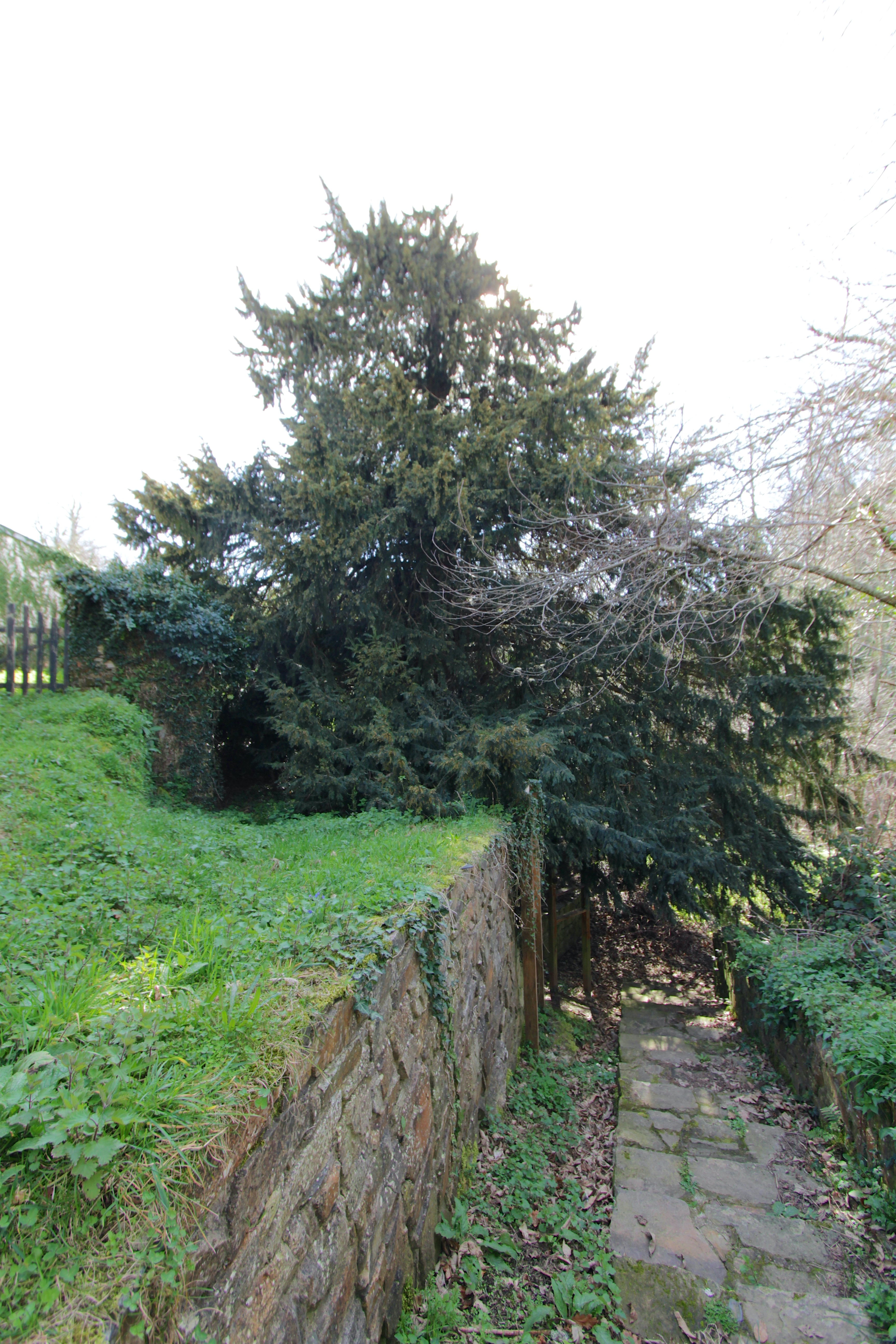 Tejo de Lago. Monumento natural del principado de Asturias y árbol centenario